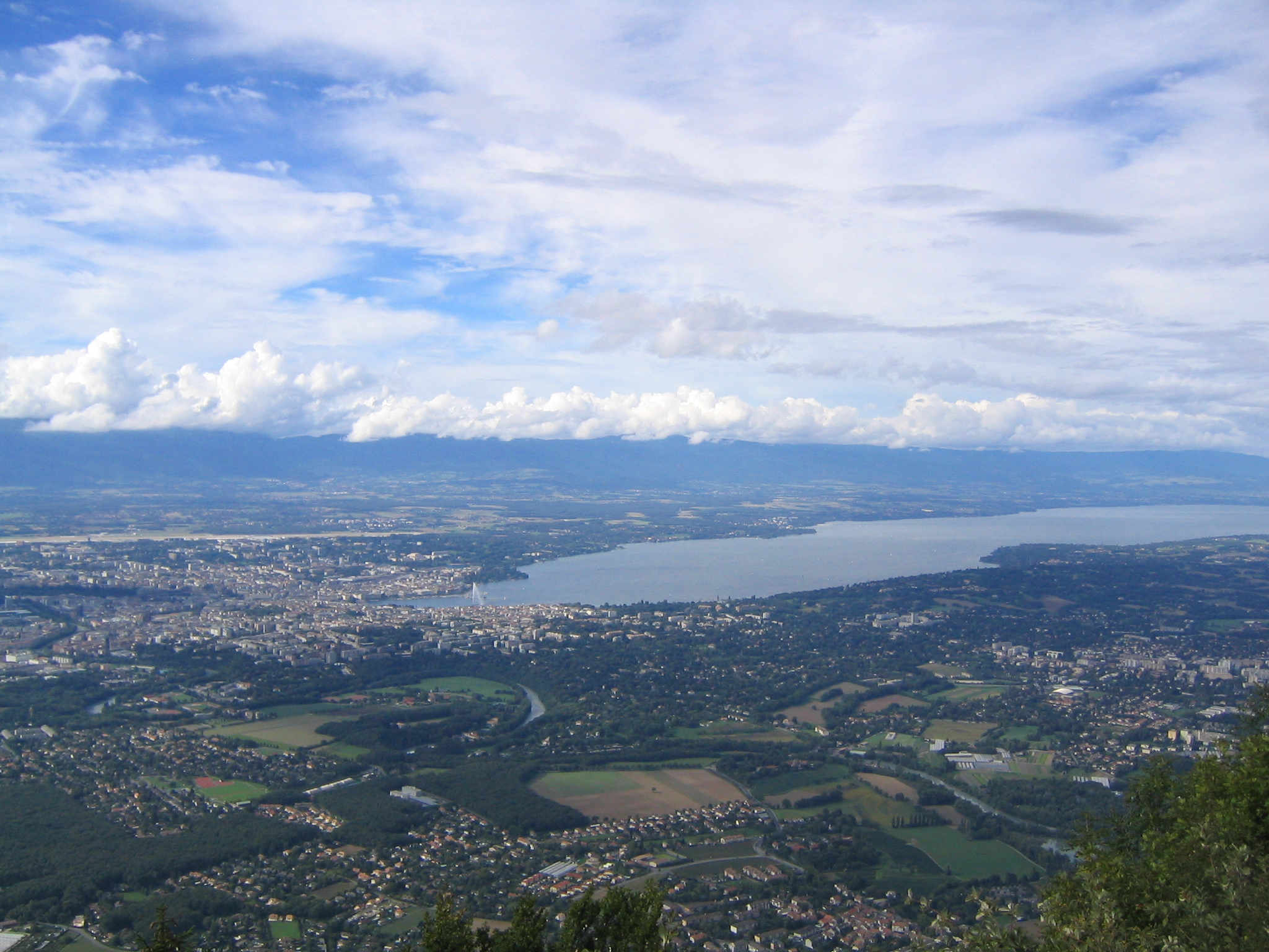 Vue de Genève, depuis le Salève, France. Derrière le jet d'eau, on remarque le palais des nations et encore l'aéroport international. Tout à gauche de l'image, la jonction de l'Arve et du Rhône. auteur Ririkuku